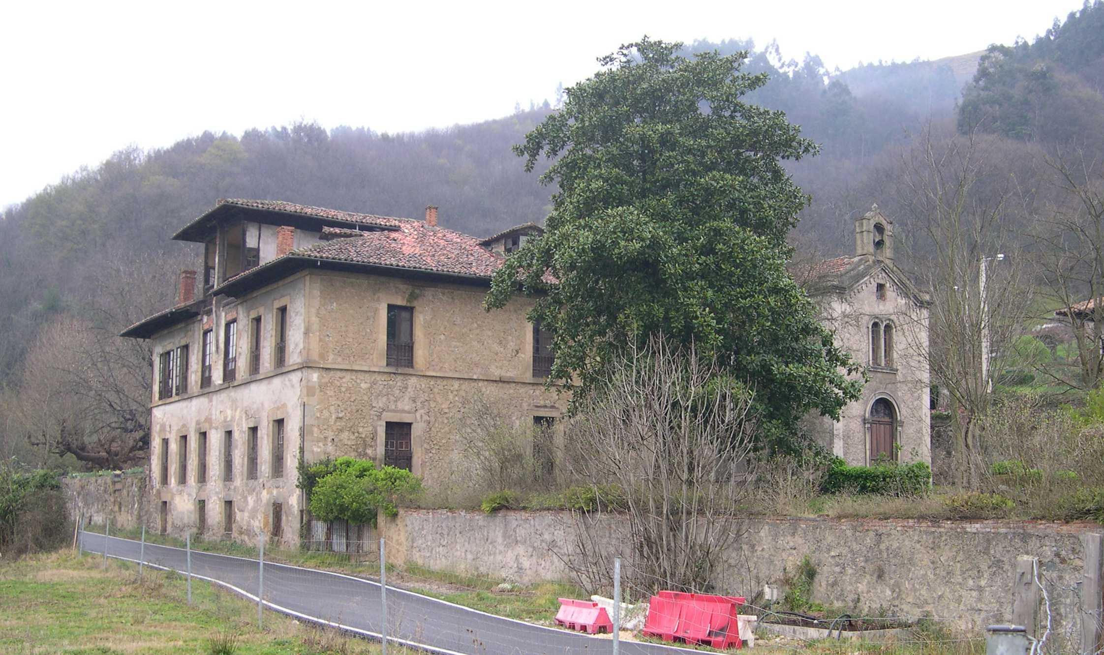 Palaciu del Marqués de Camposagrado, Riañu, Llangréu, Asturies.